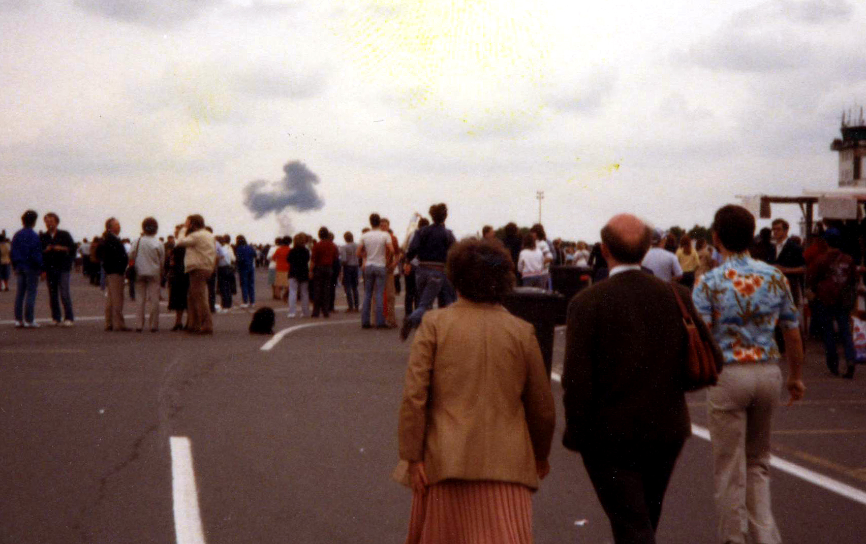 Nach dem Absturz des Starfighters am Flugtag auf der Frankfurter Air Base am 22.05.1983